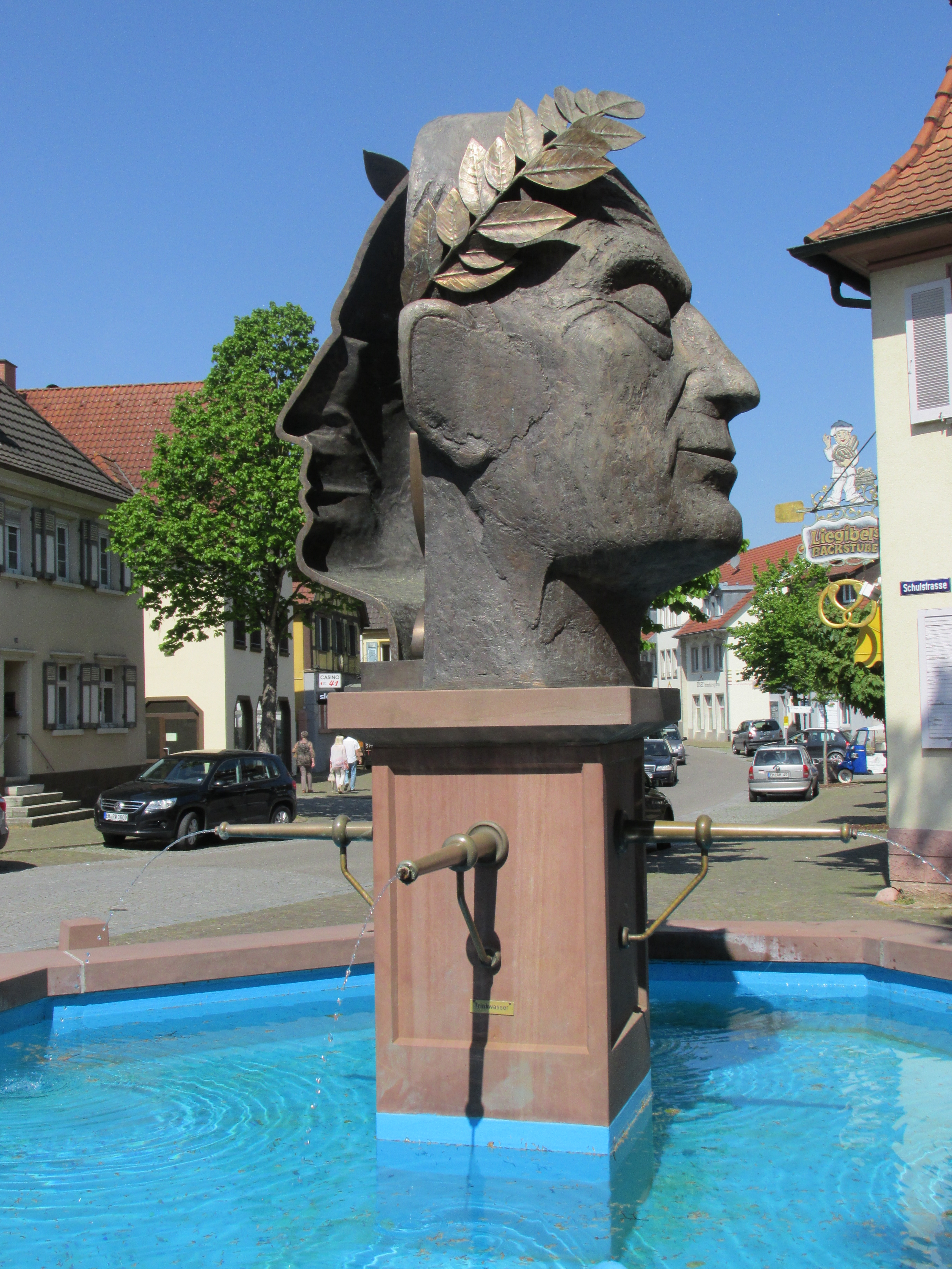 Brunnenfigur des Römischen Kaisers Vespasian in Riegel am Kaiserstuhl